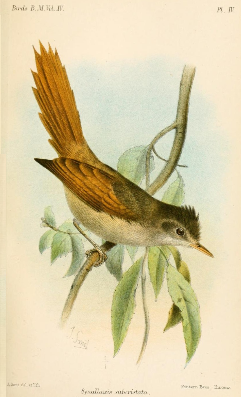 Synallaxis subcristata = Cranioleuca subcristata, Crested Spinetail